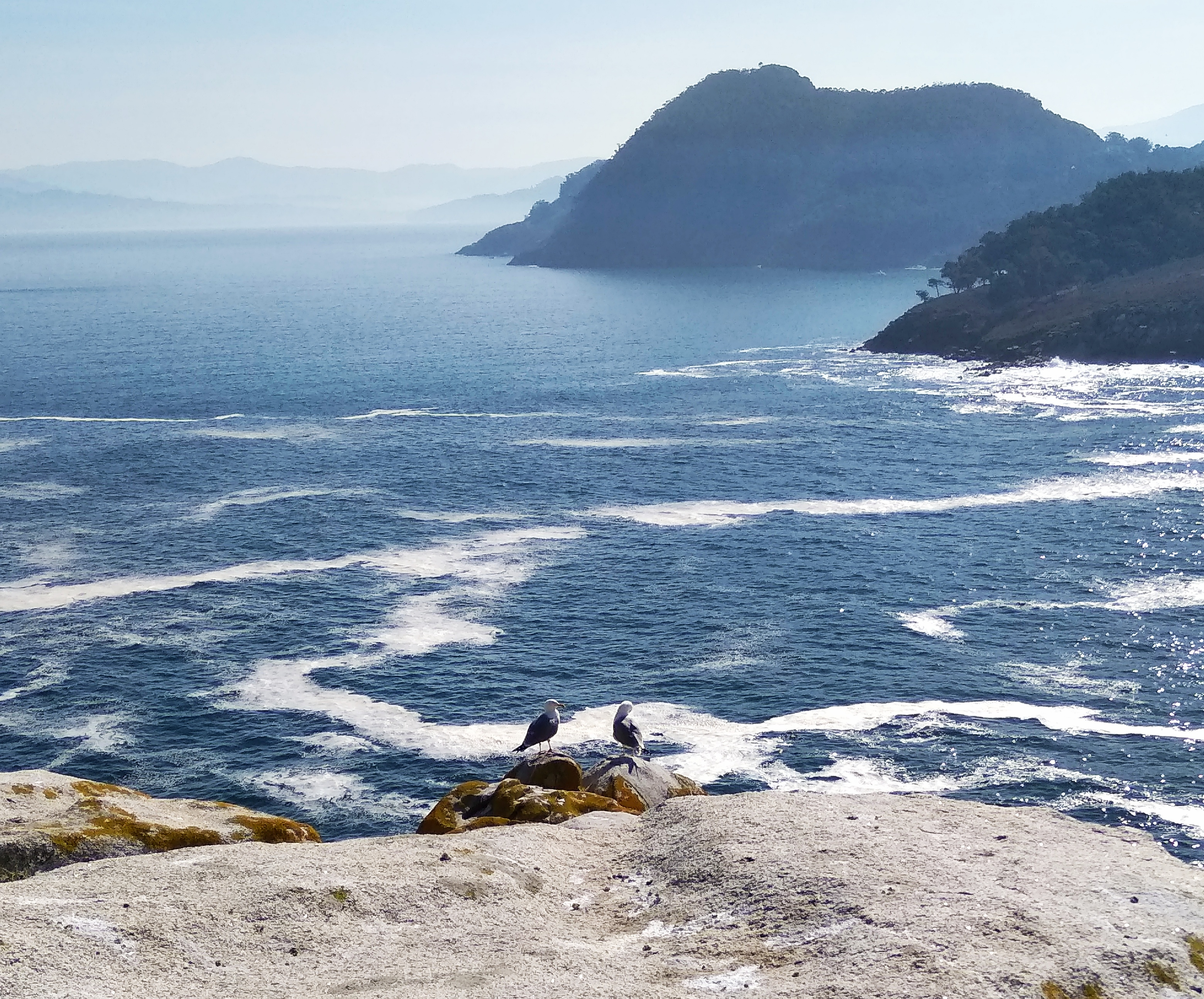 Vista da costa no Parque Nacional Illas Atlánticas.